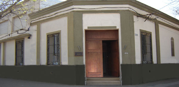 Frente del actual edificio de Instituto Santa Marta de Colón, Buenos Aires, Argentina.